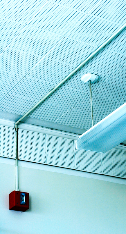 Fire alarm